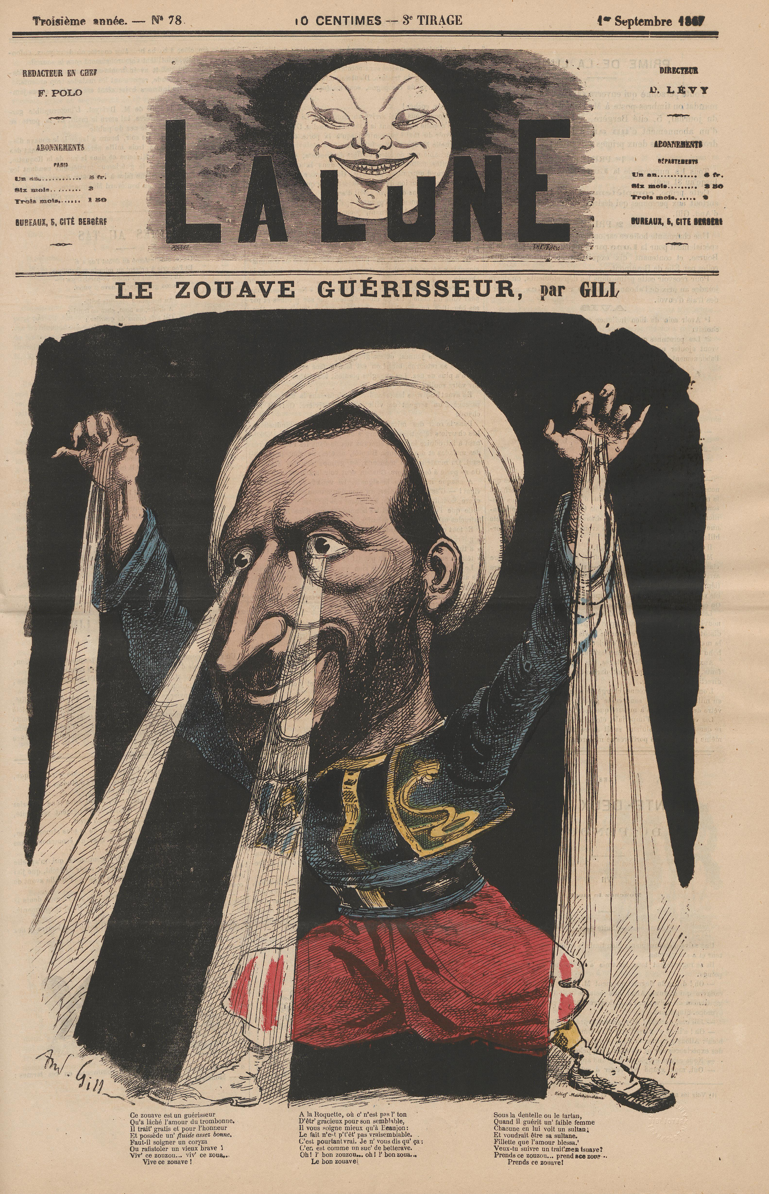 Caricature du guérisseur Auguste Henri Jacob dans La Lune.